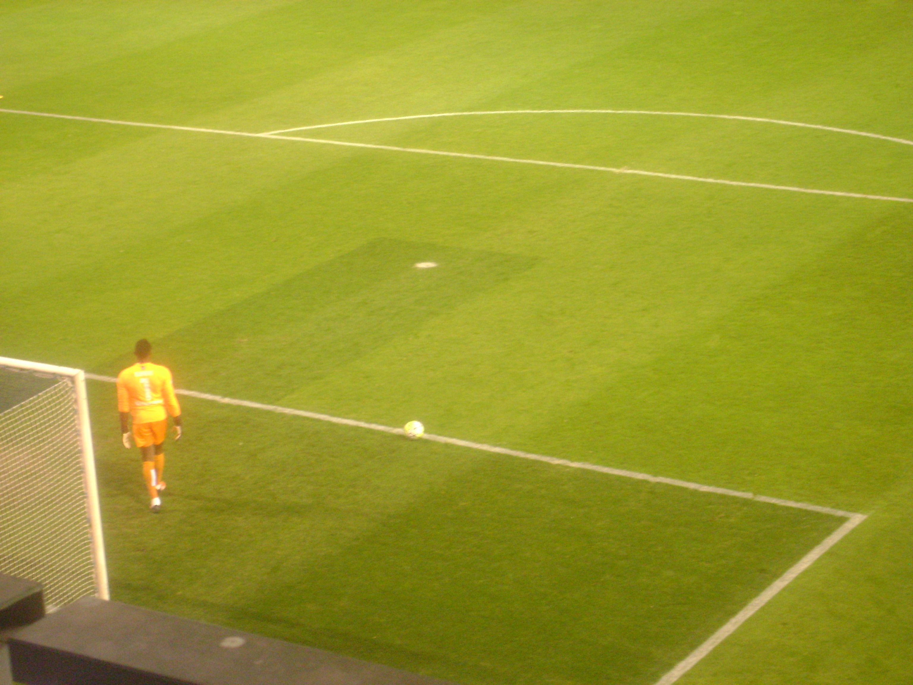 Kameni